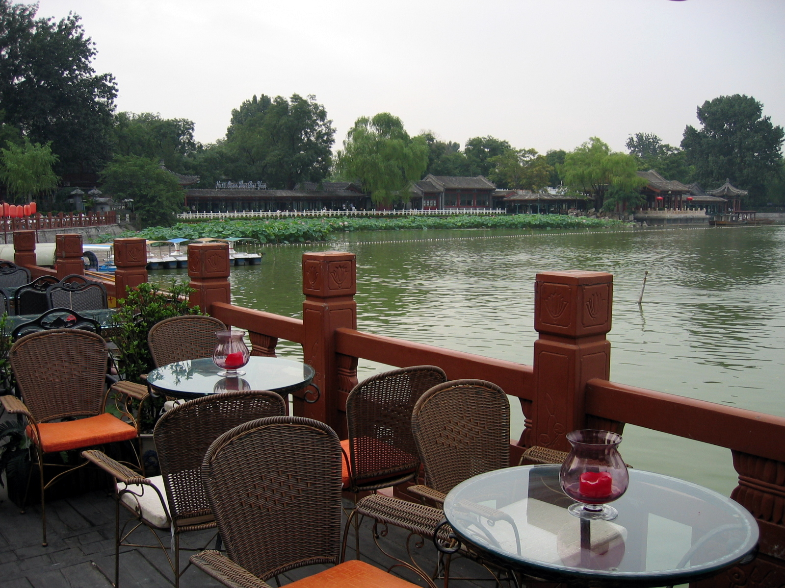 Shichahai F&B Outlet View1 2004 什剎海酒吧區